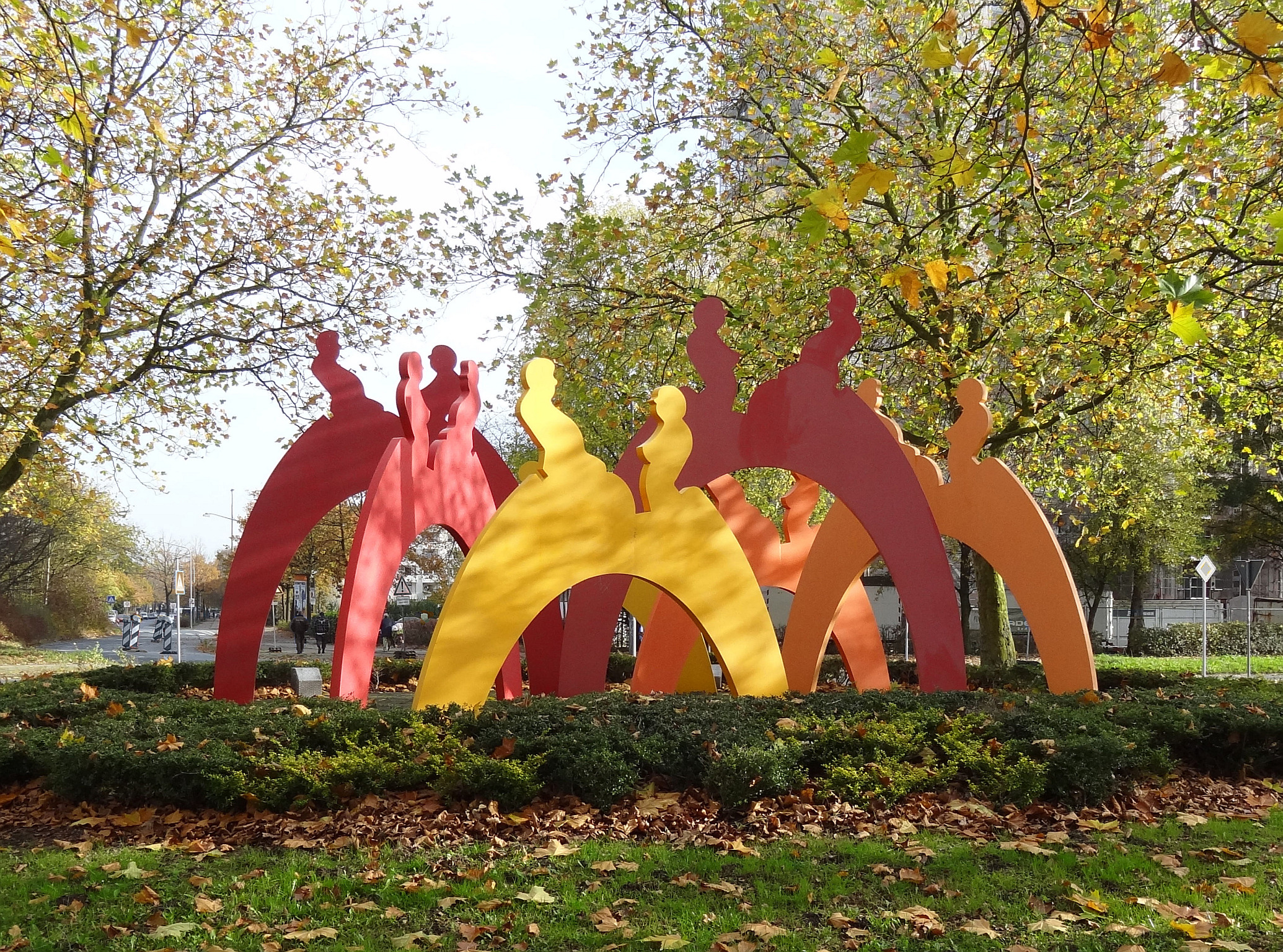 Stahlskulptur "Paare" von Hans-J. Müller